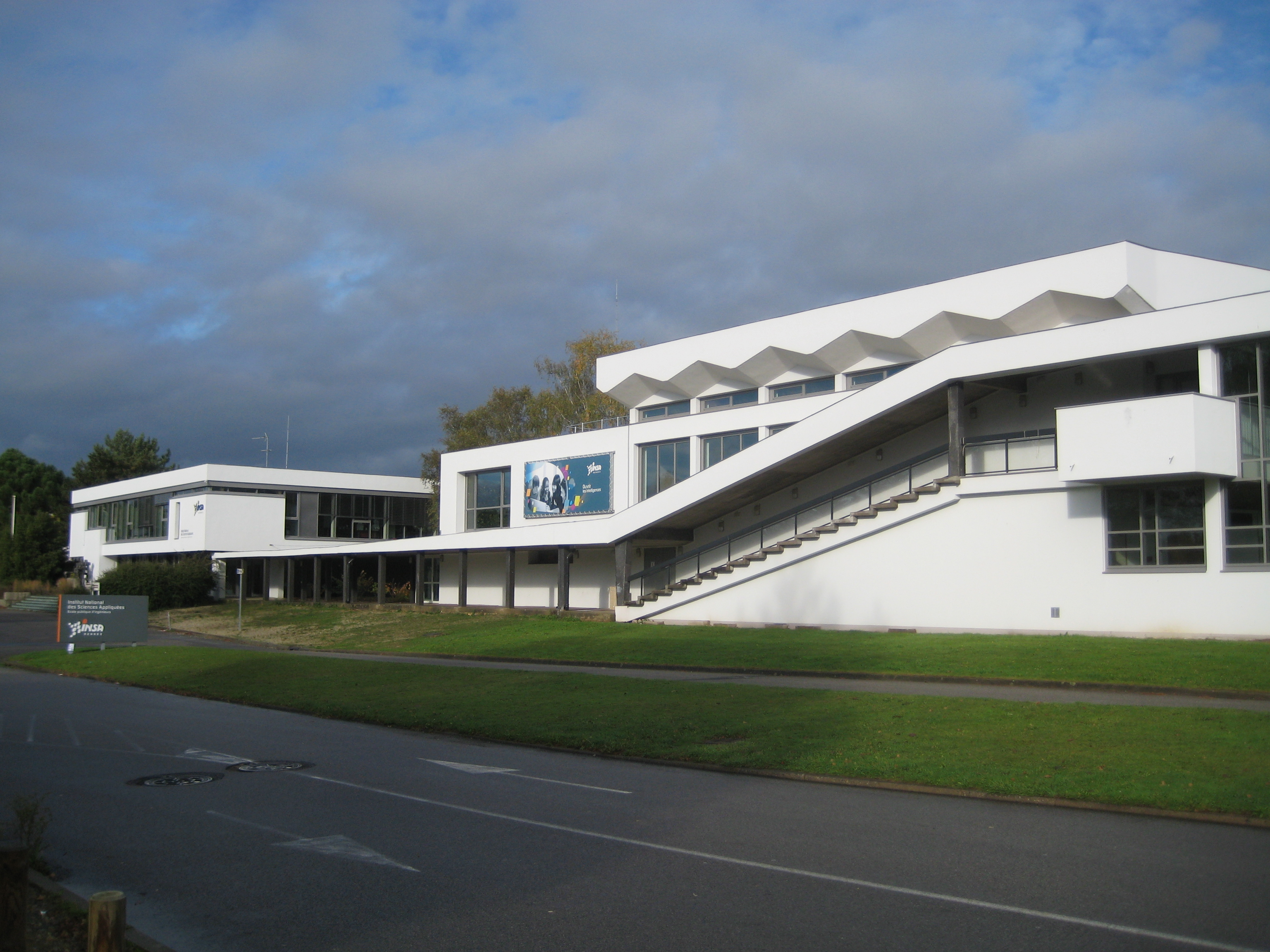 INSA Rennes, Campus de beaulieu